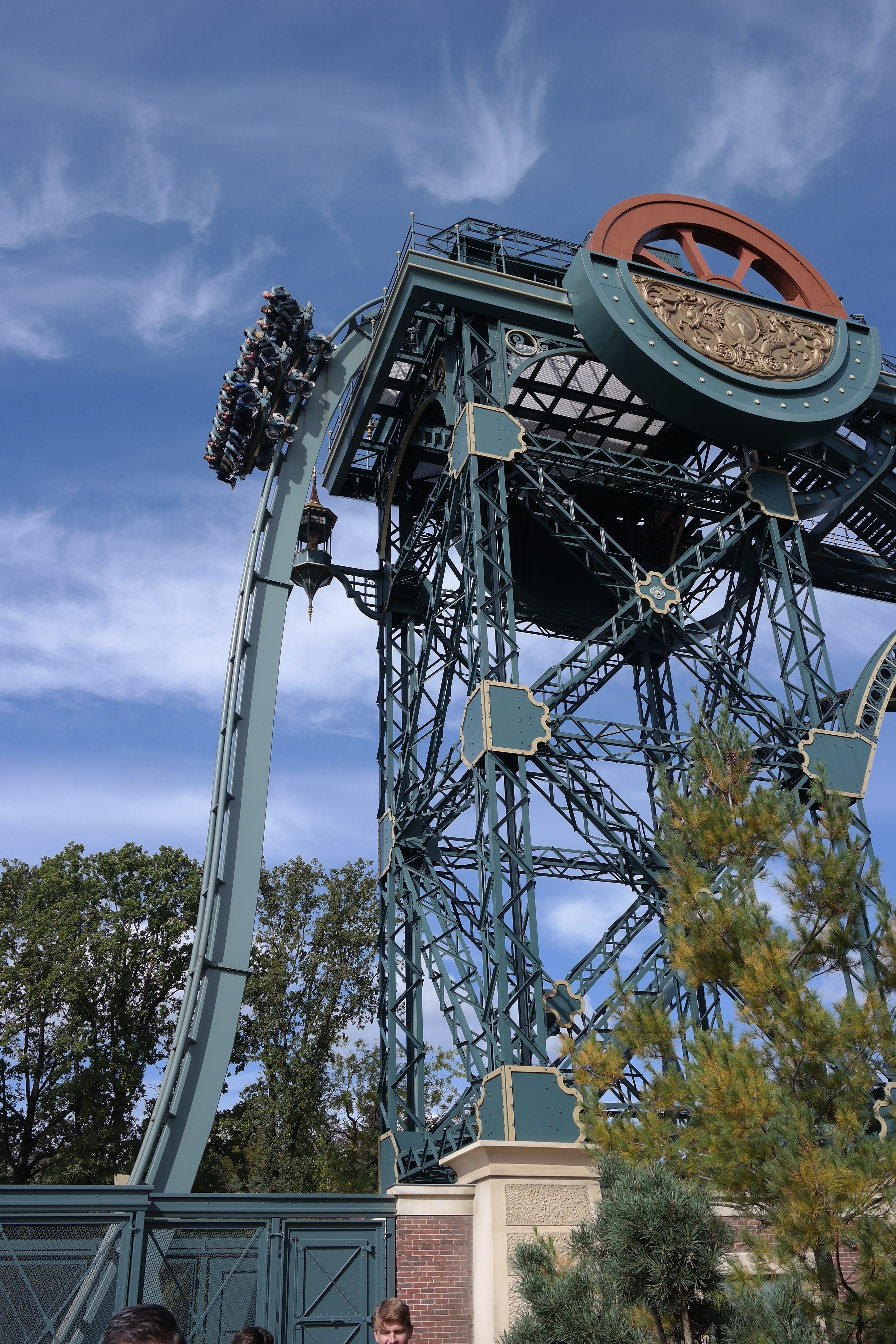 De Baron 1898, een achtbaan in pretpark Efteling.